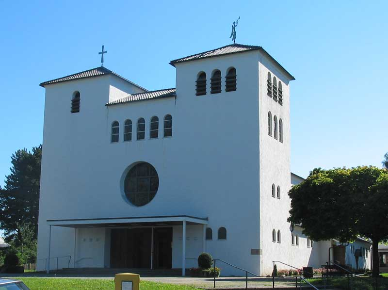 St. Michael Kirche, Arnsberg-Neheim, 1950–1951 erbaut